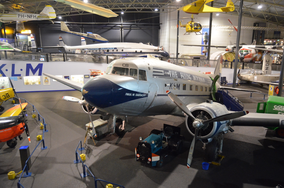 Aviodrome Lelystad. DC3 (PH-TCB) 'Iwan W. Smirnoff'. Foto: Erik Swierstra.